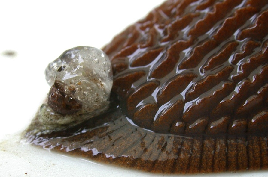 Schleimansammlumg am Schneckenende